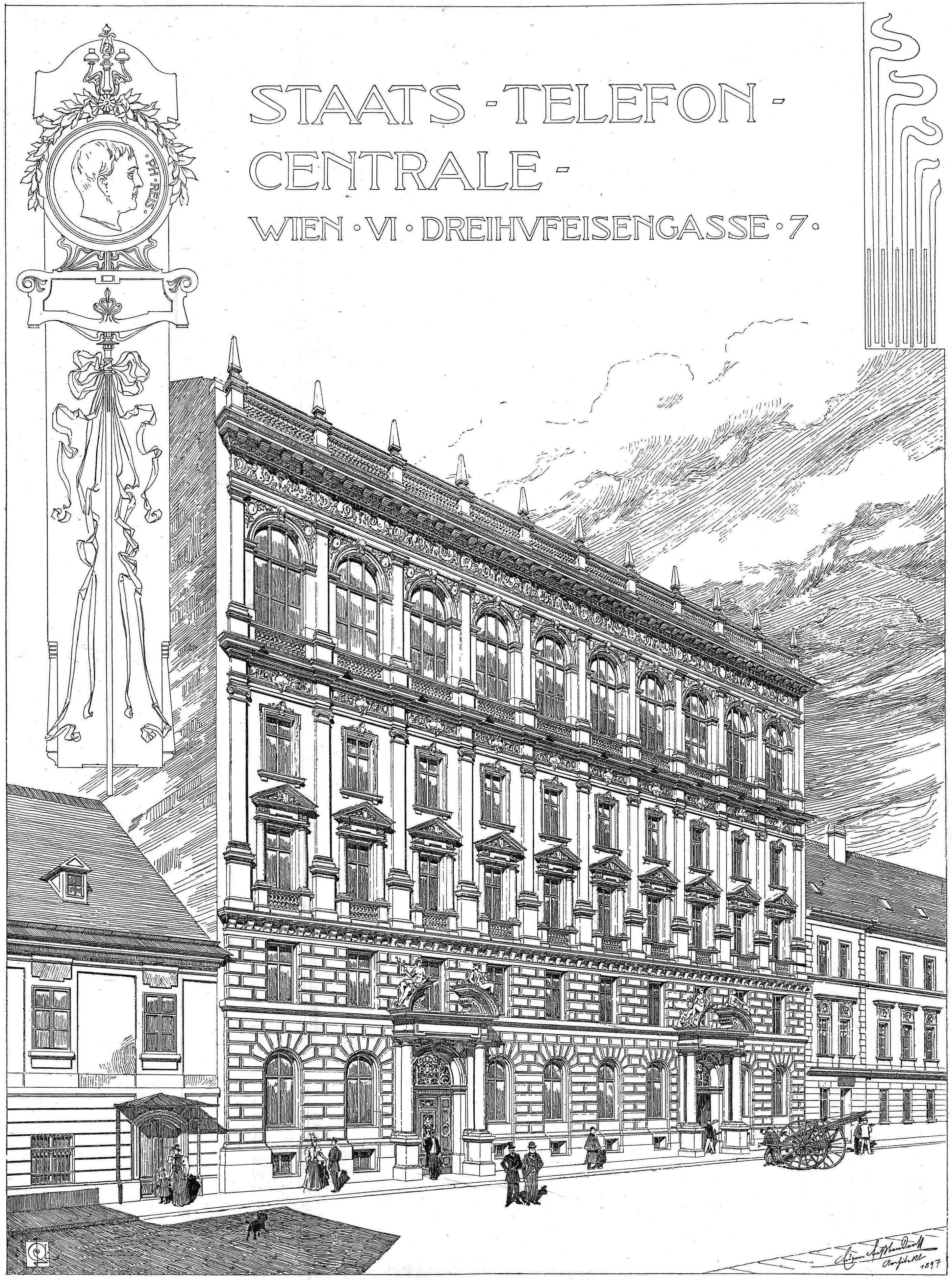 Wien-Mariahilf, Dreihufeisengasse 7 (heute: Lehargasse 7), Centrale I des Staatstelephons